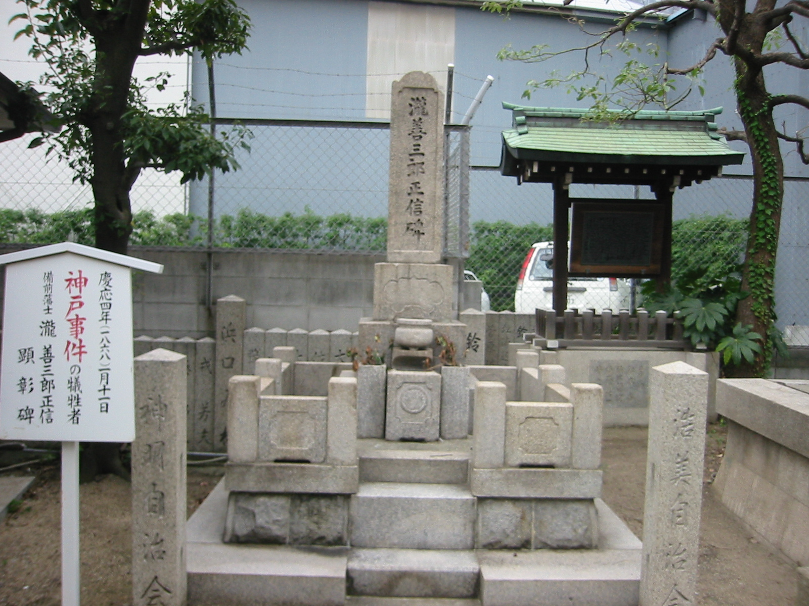 能福寺、瀧善三郎正信碑